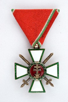 Magyar Érdemrend hadidíszítményes lovagkeresztje